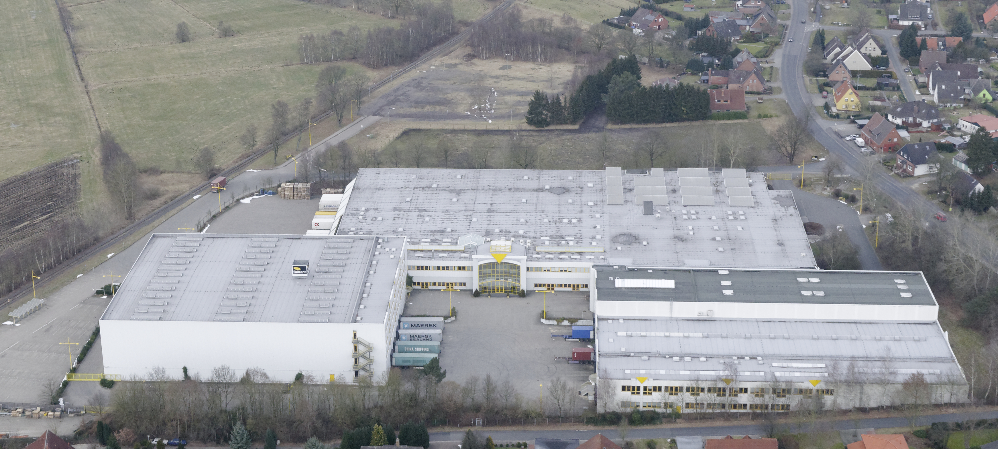 Luftaufnahme: Brilliant AG in Gnarrenburg